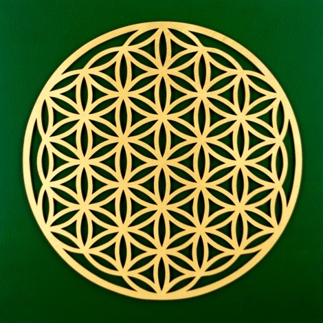 simbol roža življenja